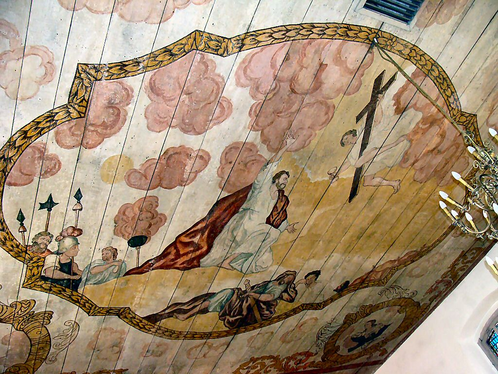 Kościół Św. Trójcy - Szczecin Krzekowo